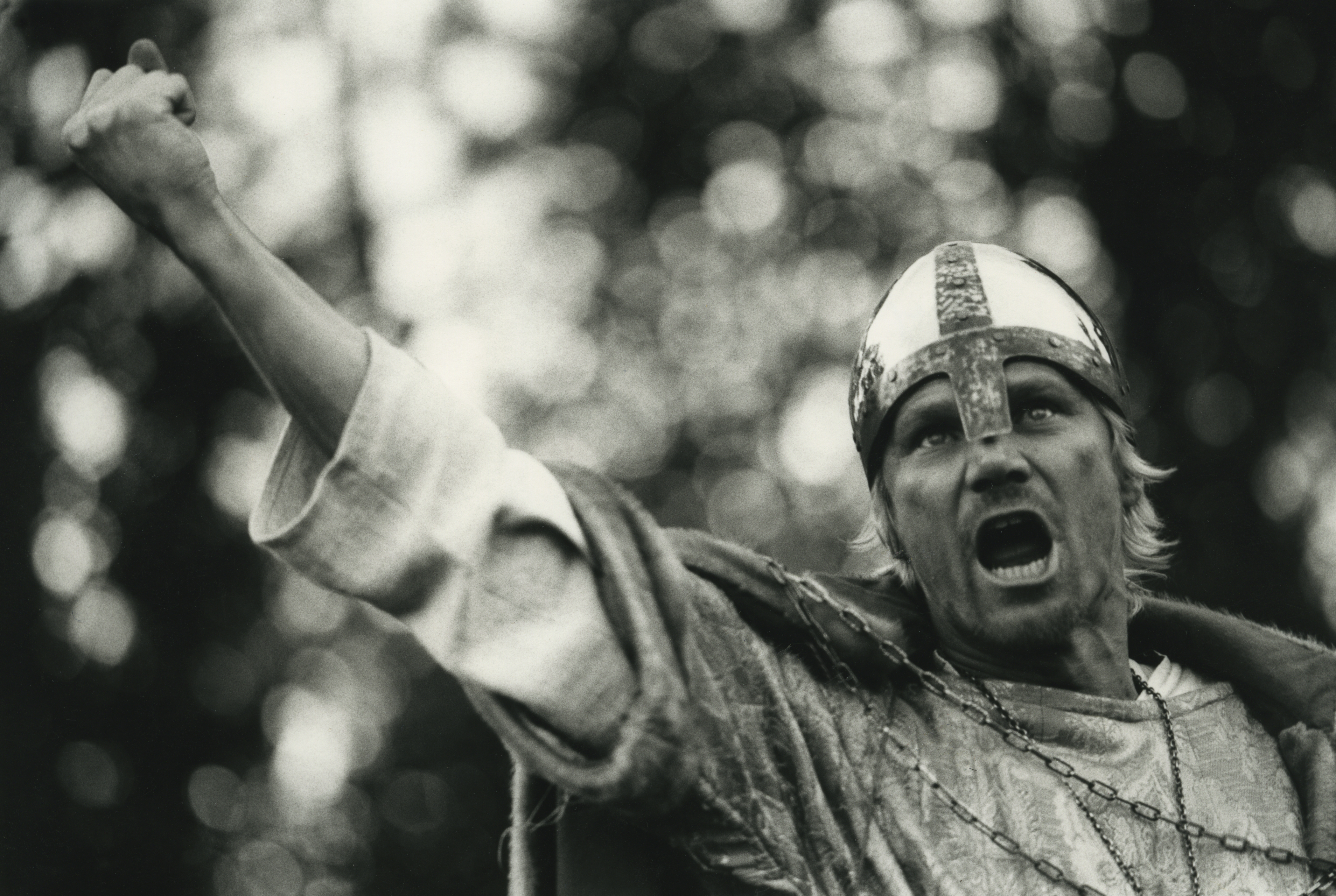 Norwegian actor Per Frisch as king Olaf II of Norway in the The Saint Olav Drama at Stiklestad 1987.